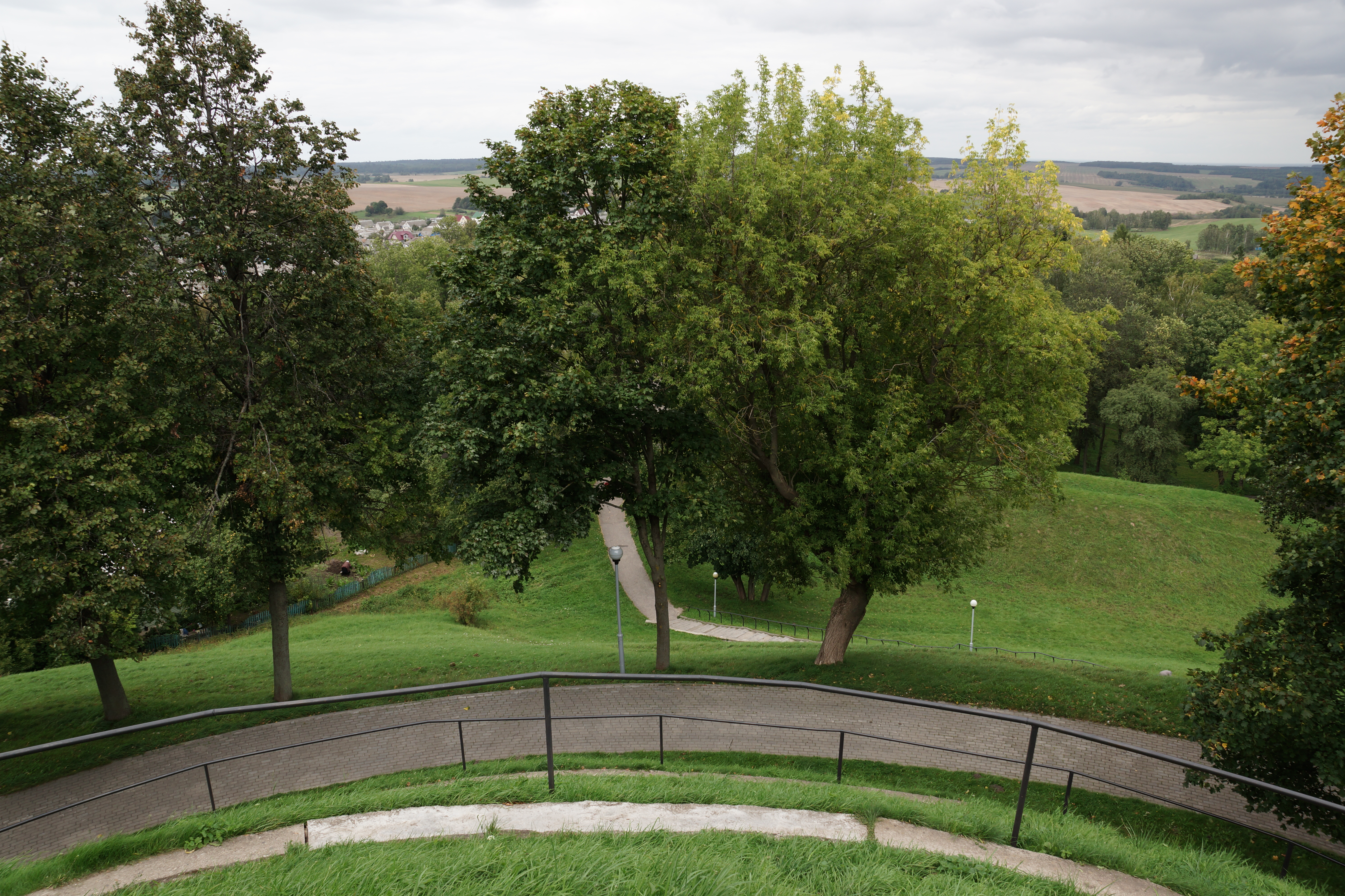 Беларуская (тарашкевіца): Курган Бессьмяротнасьці Адама Міцкевіча. г. Наваградак This is a photo of Belarusian heritage monument. Reference number: 411Д000405 ( WLM)